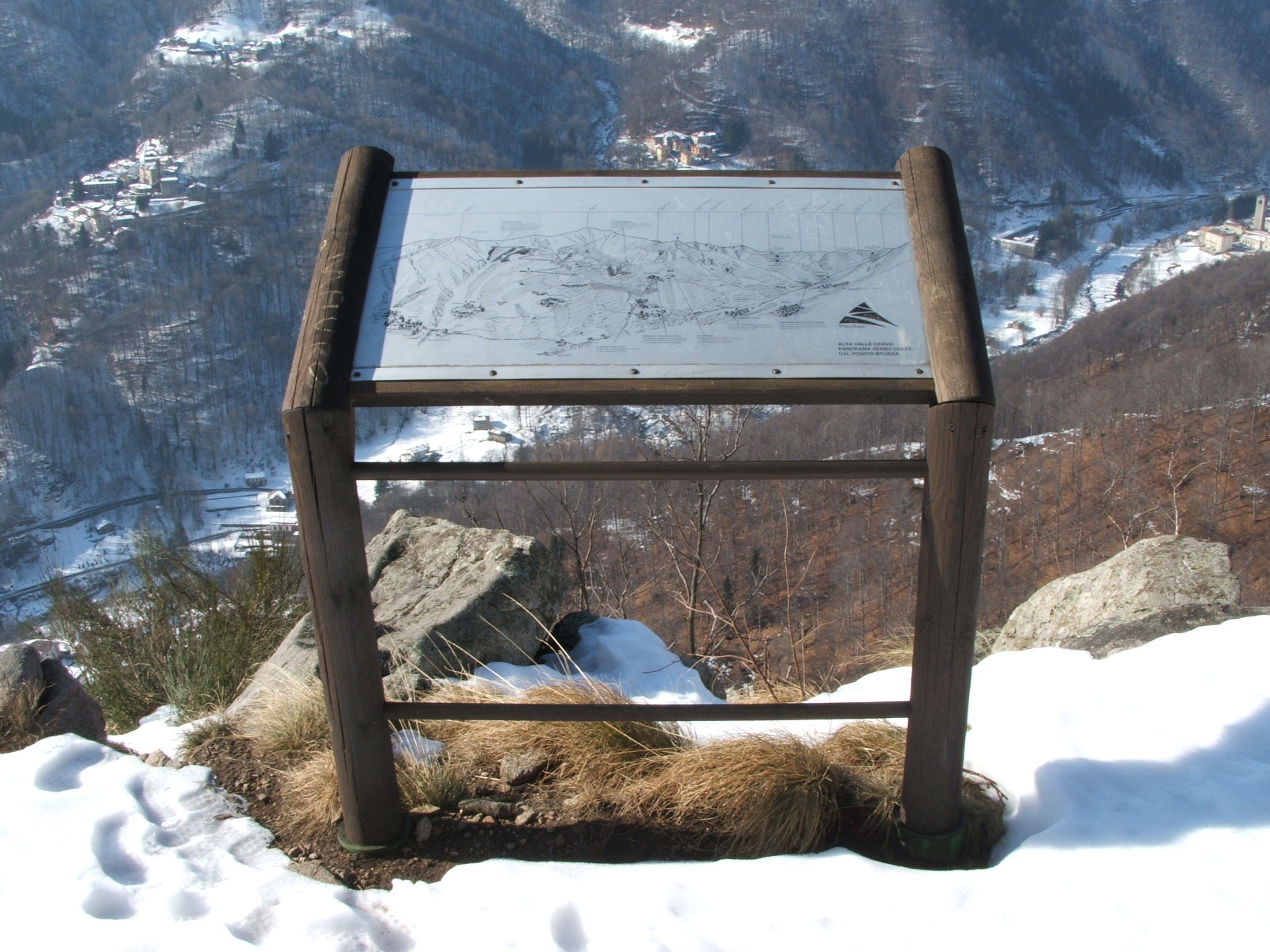 Valle Sessera, zona di Bocchetto Séssera e Bielmonte, Biella (Piemonte, Italia) in inverno